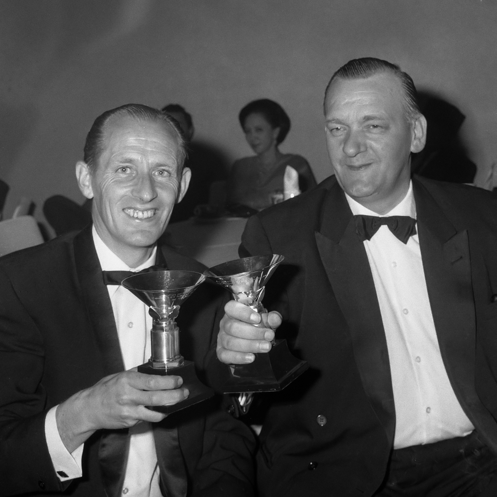 De heren Bob Slavenburg (rechts) en Hans Kreijns, kampioen Bridge paren 1966 met de bekers 16 mei 1966